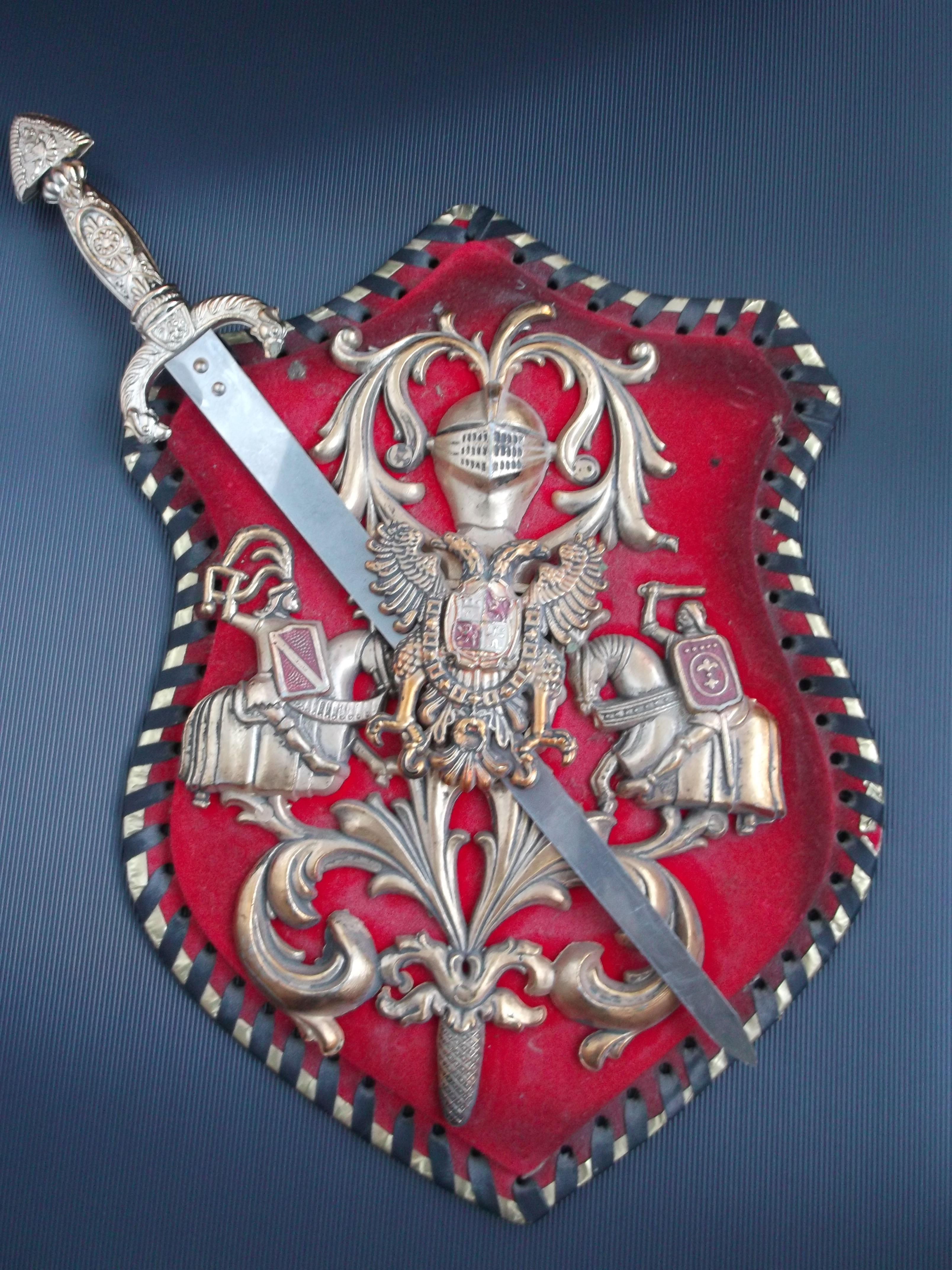 Simbolul nobiliar ,intre istorie si arta